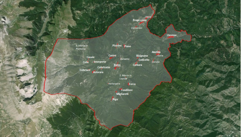 mappa satellitare del comune di Montegallo, AP, con indicate le frazioni che compongono il comune